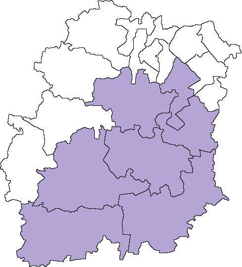 Carte de la deuxième circonscription de l'Essonne (91) entre 1967 et 1986